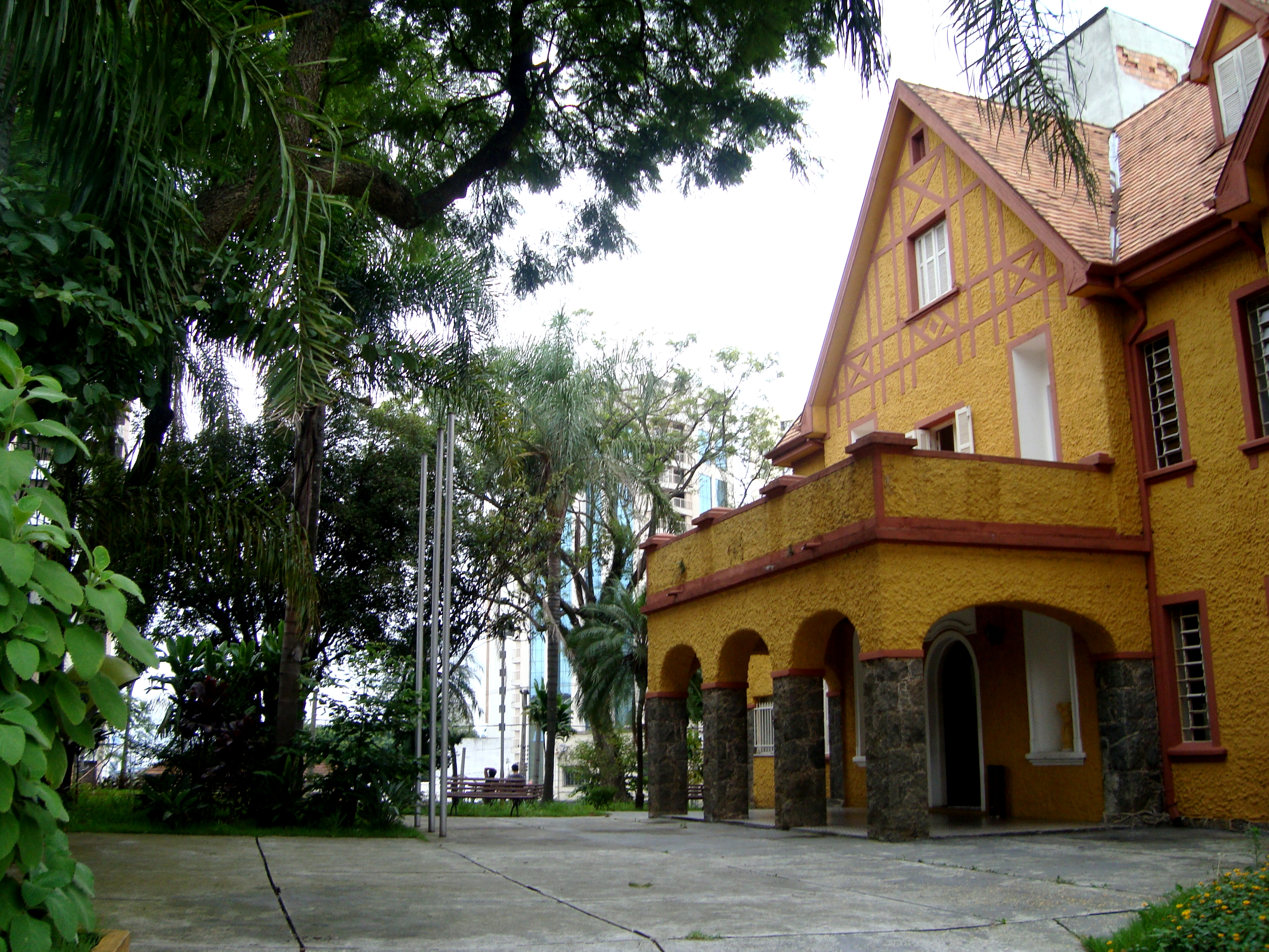 Detalhes da biblioteca narbal fontes no Alto de Santana/SP